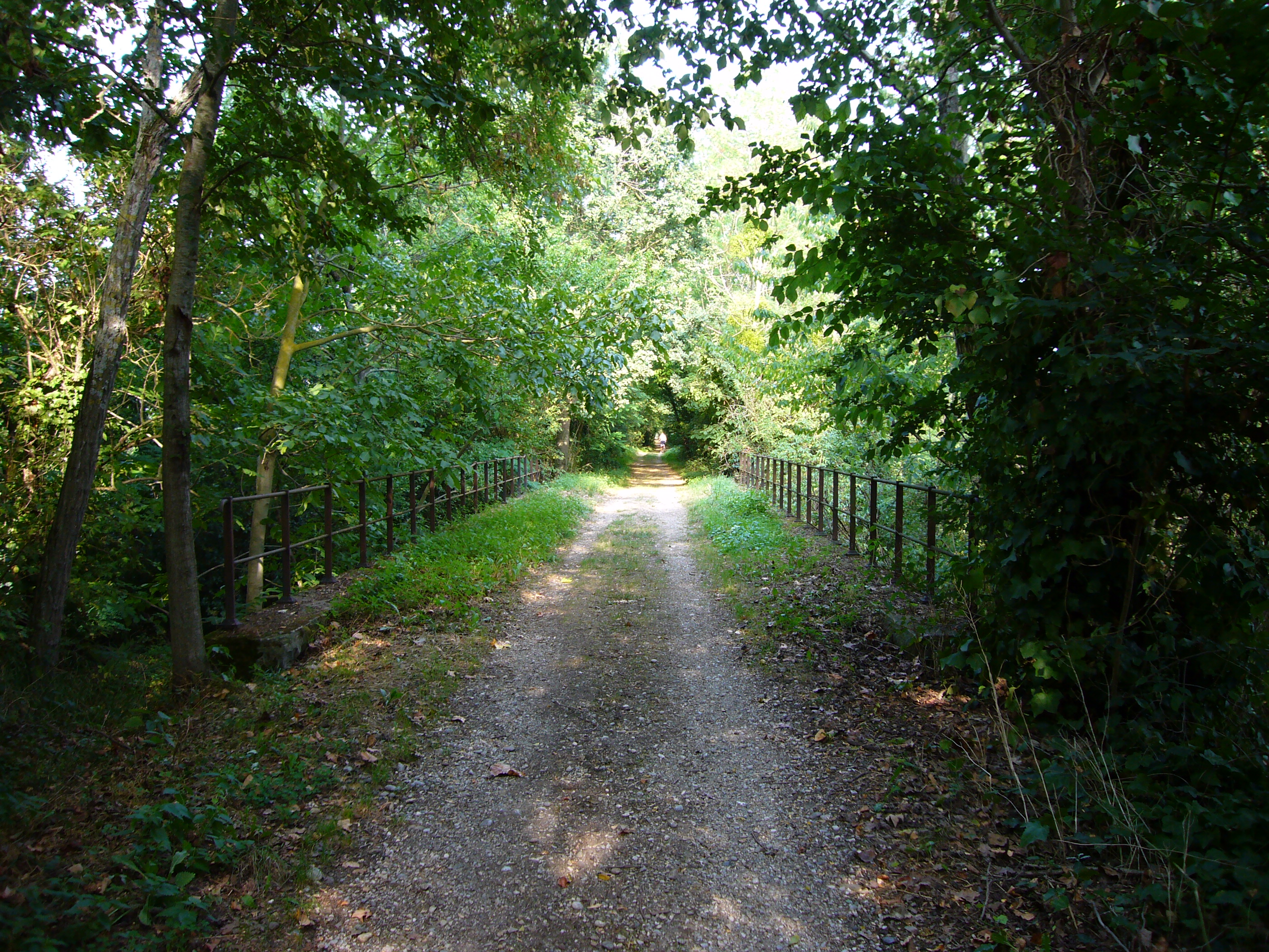 Voie ferrée desaffectée Pamiers-Limoux (Ariège, France).